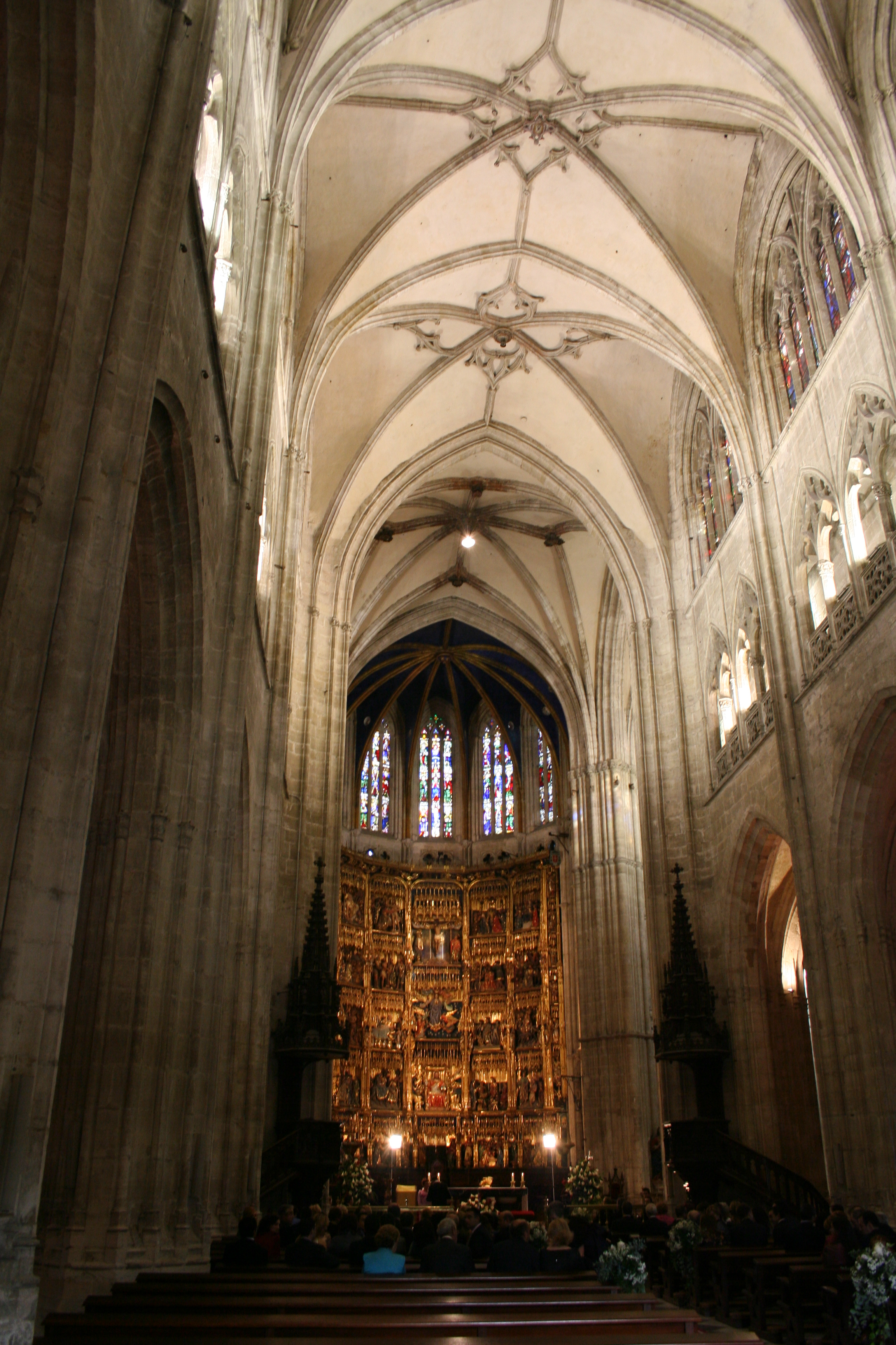 Nave central de la catedral de Oviedo